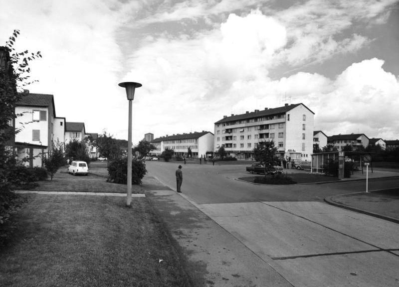 Neue Wohnsiedlung in Neckarsulm/Württemberg-Baden